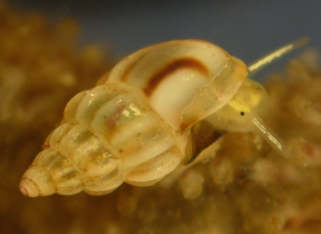 Rissoa parva. Coquille et partie antérieure du corps